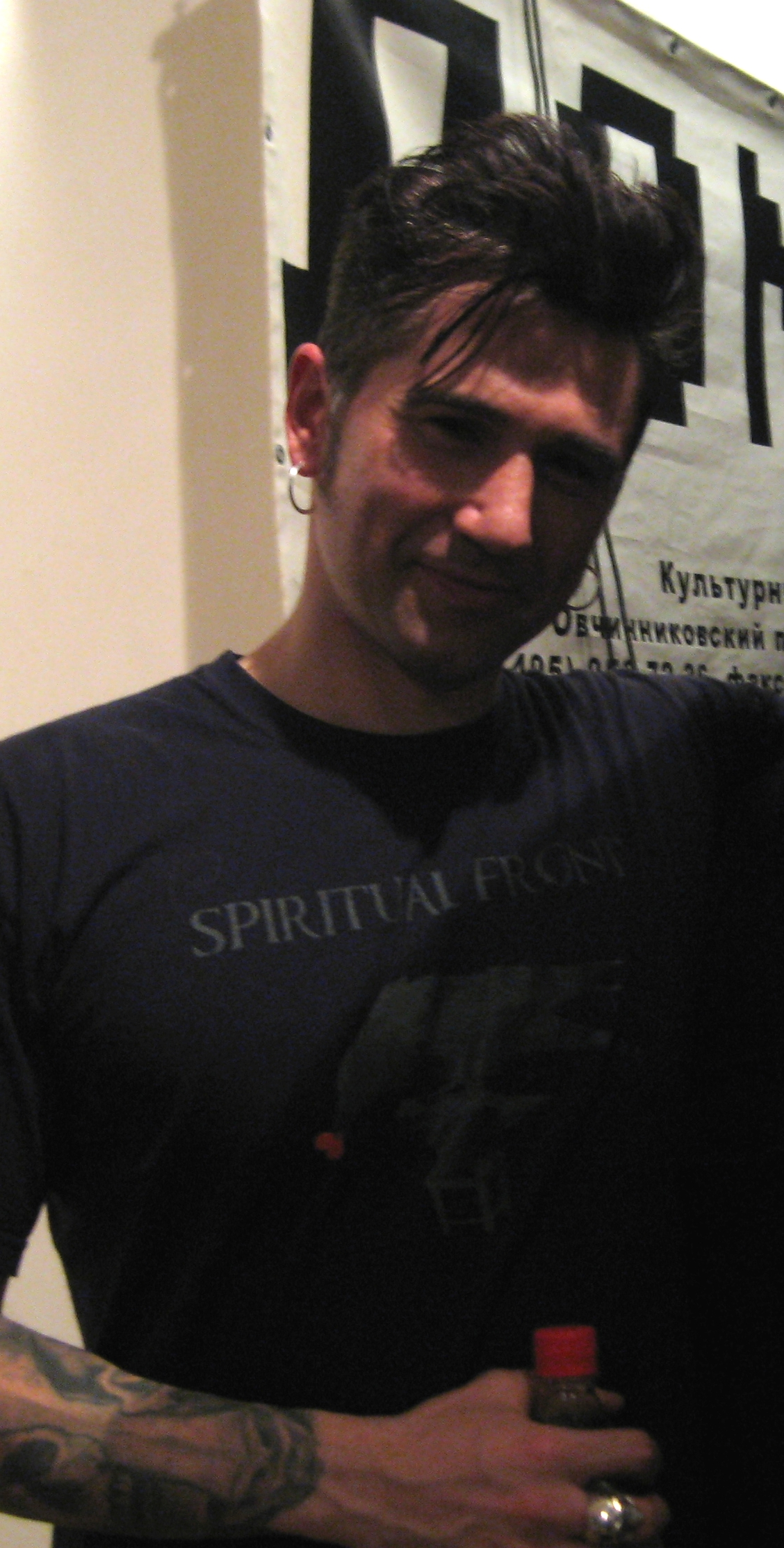 Simone "Hellvis" Salvatori (Spiritual Front) in Moscow, october 2010